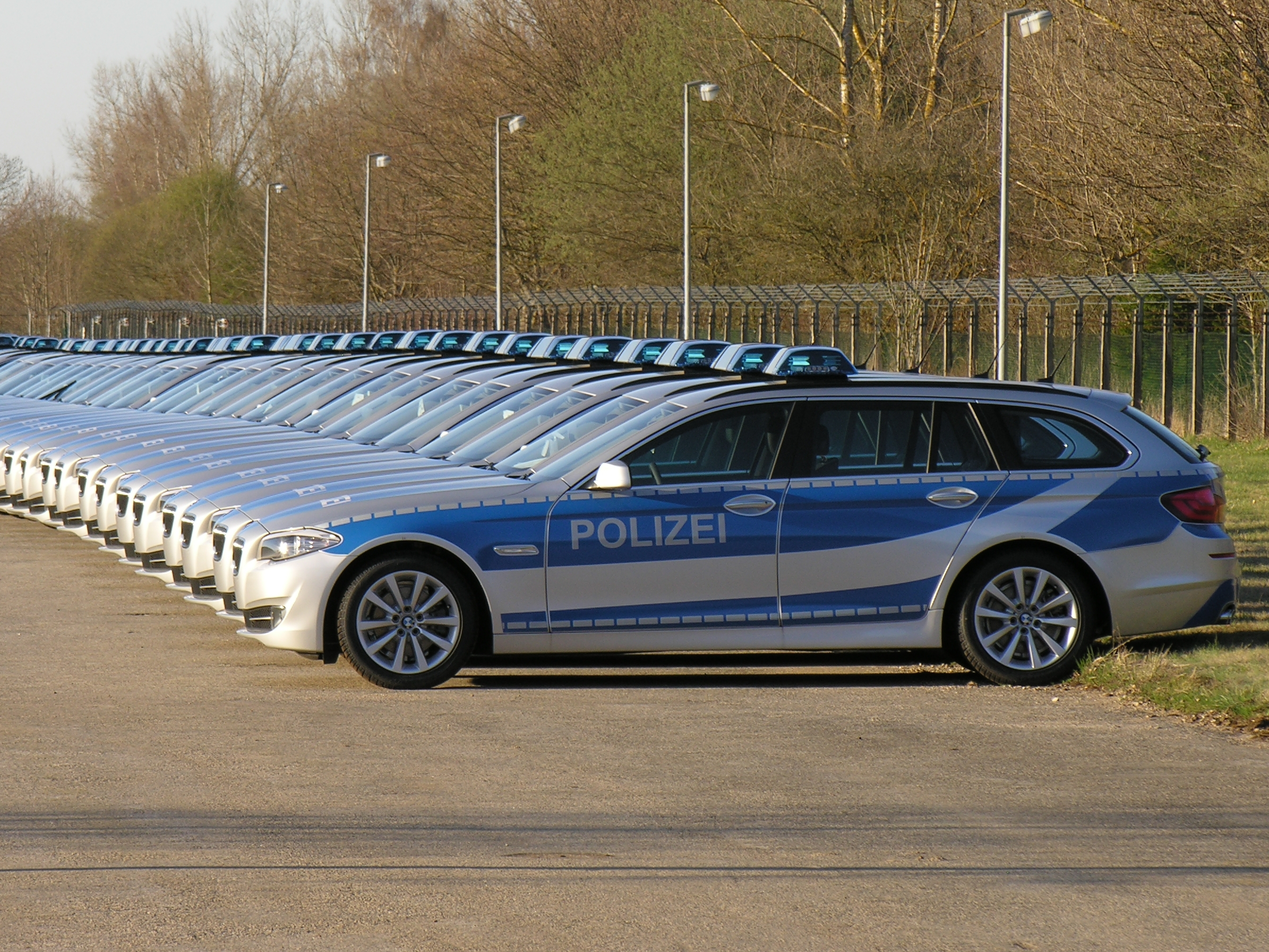 Einsatzfahrzeuge für die Bundespolizei Fabrikat BMW - keine Fotomontage - Foto 2011 Wolfgang Pehlemann DSCN7345